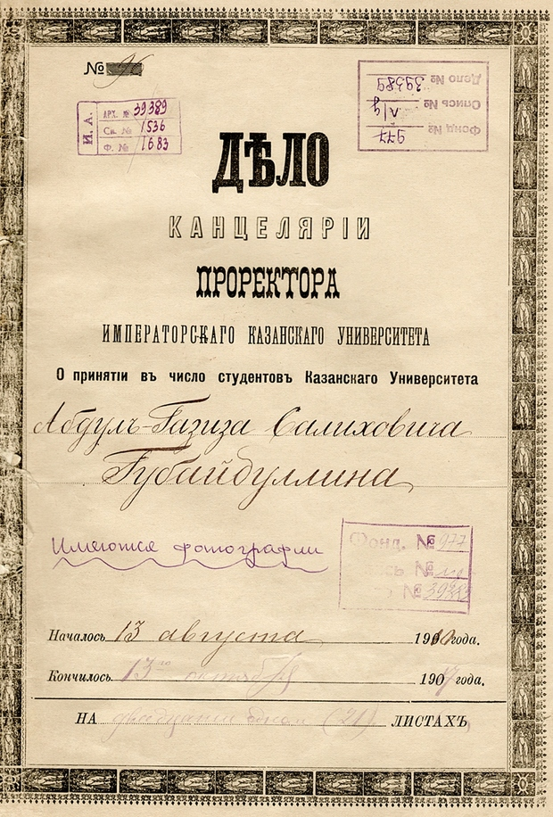 Личное дело студента Казанского университета Г. Губайдуллина 1910—1917 гг